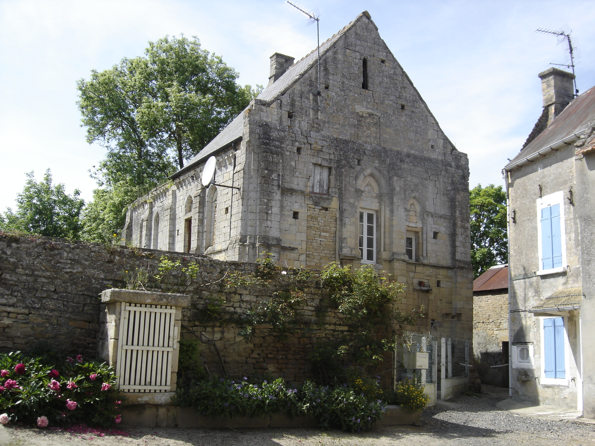 la chapelle Sainte Christine transformée en maison d'habitation